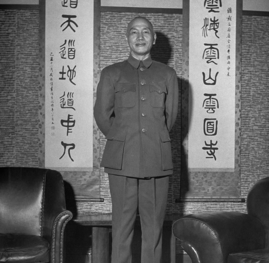 蒋介石，臺灣。